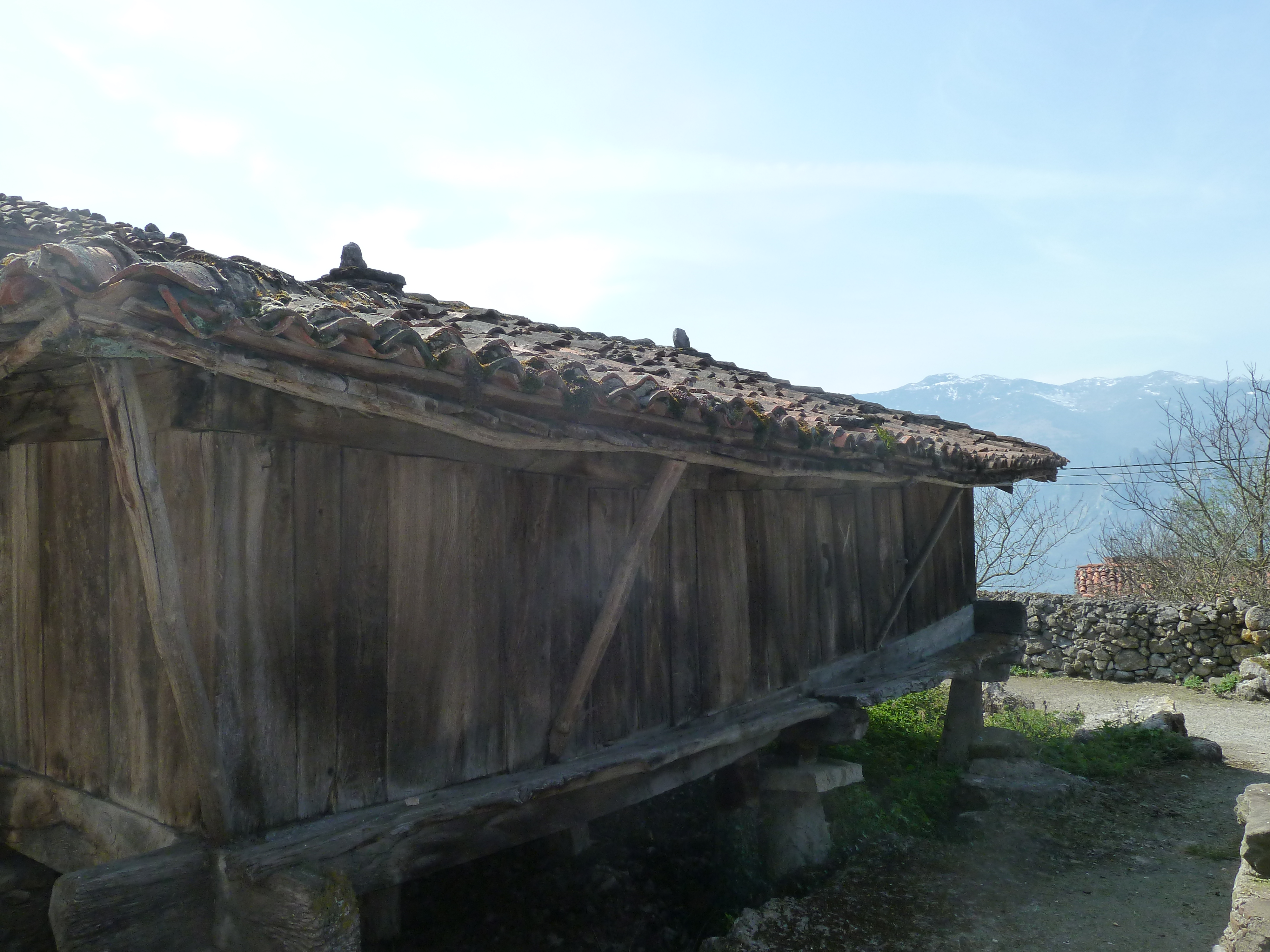 Panera del llugar de Bermiego (Quirós).